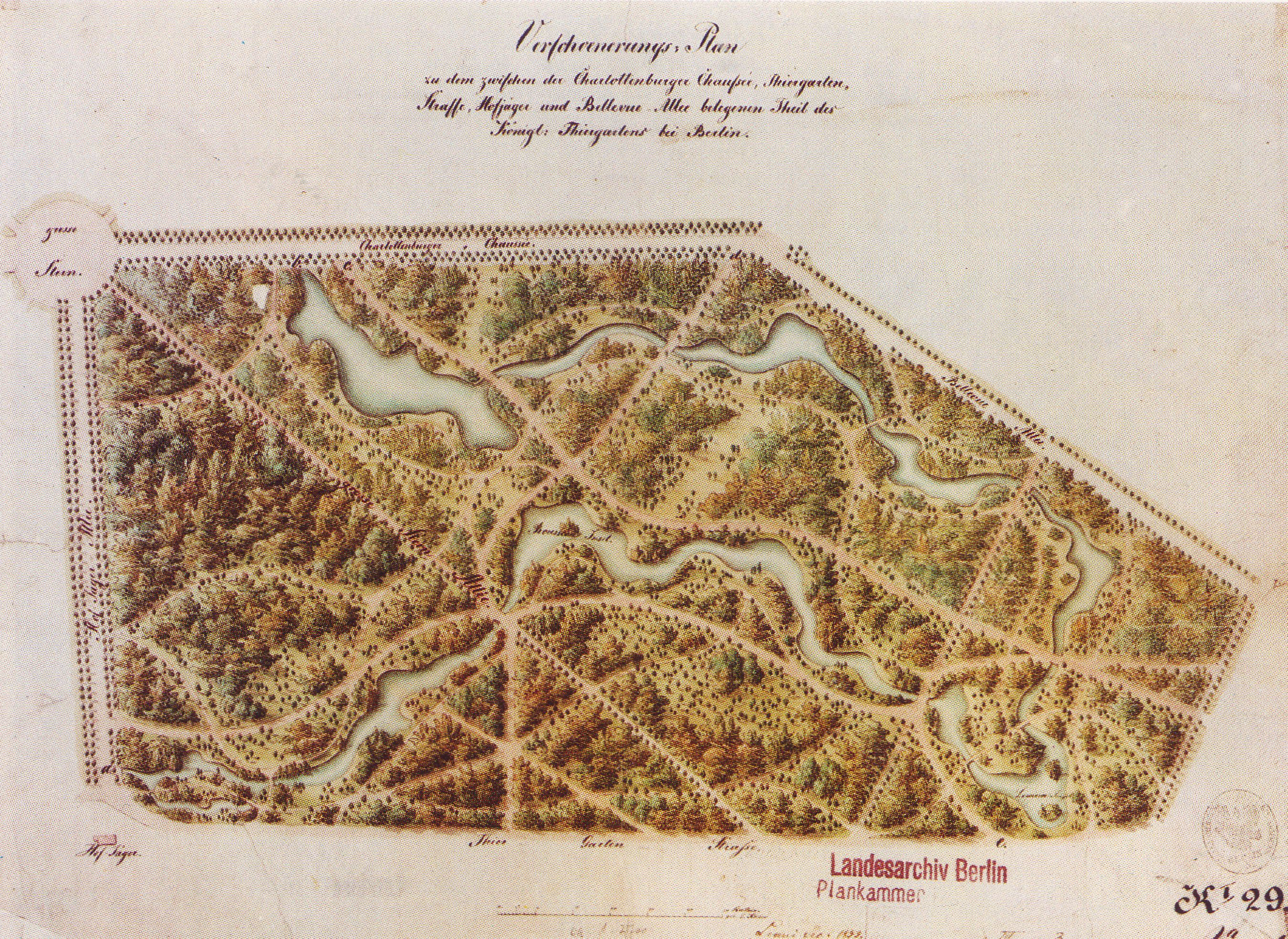 "Verschoenerungs-Plan zu dem zwischen der Charlottenburger Chaussée, Thiergarten-Straße, Hofjäger- und Bellevue-Allée belegenen Theil des Königl. Thiergartens bei Berlin"; redesign plan by Peter Joseph Lenné for Tiergarten park in Berlin, drawn by Gerhard Koeber, quill, pencil and watercolor, 38,0x50,7cm, Landesarchiv Berlin